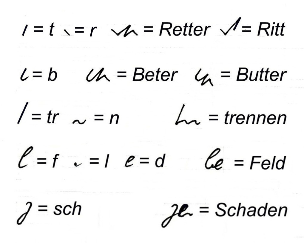 Muster von stenografischen Zeichen mit Wortbeispielen (Deutsche Einheitskurzschrift - Wiener Urkunde)